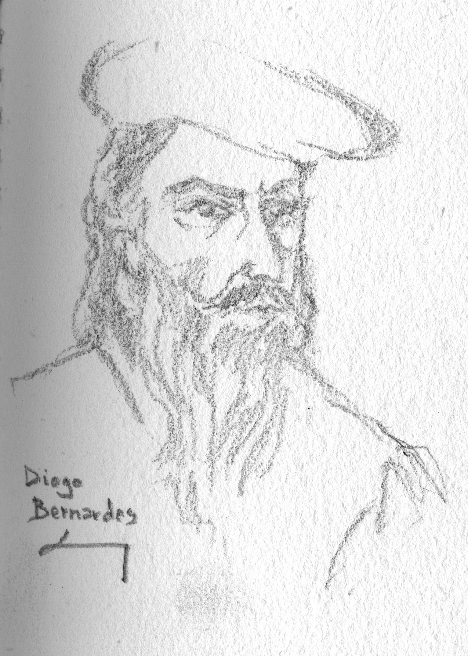 dessin de Victor Couto d'après document